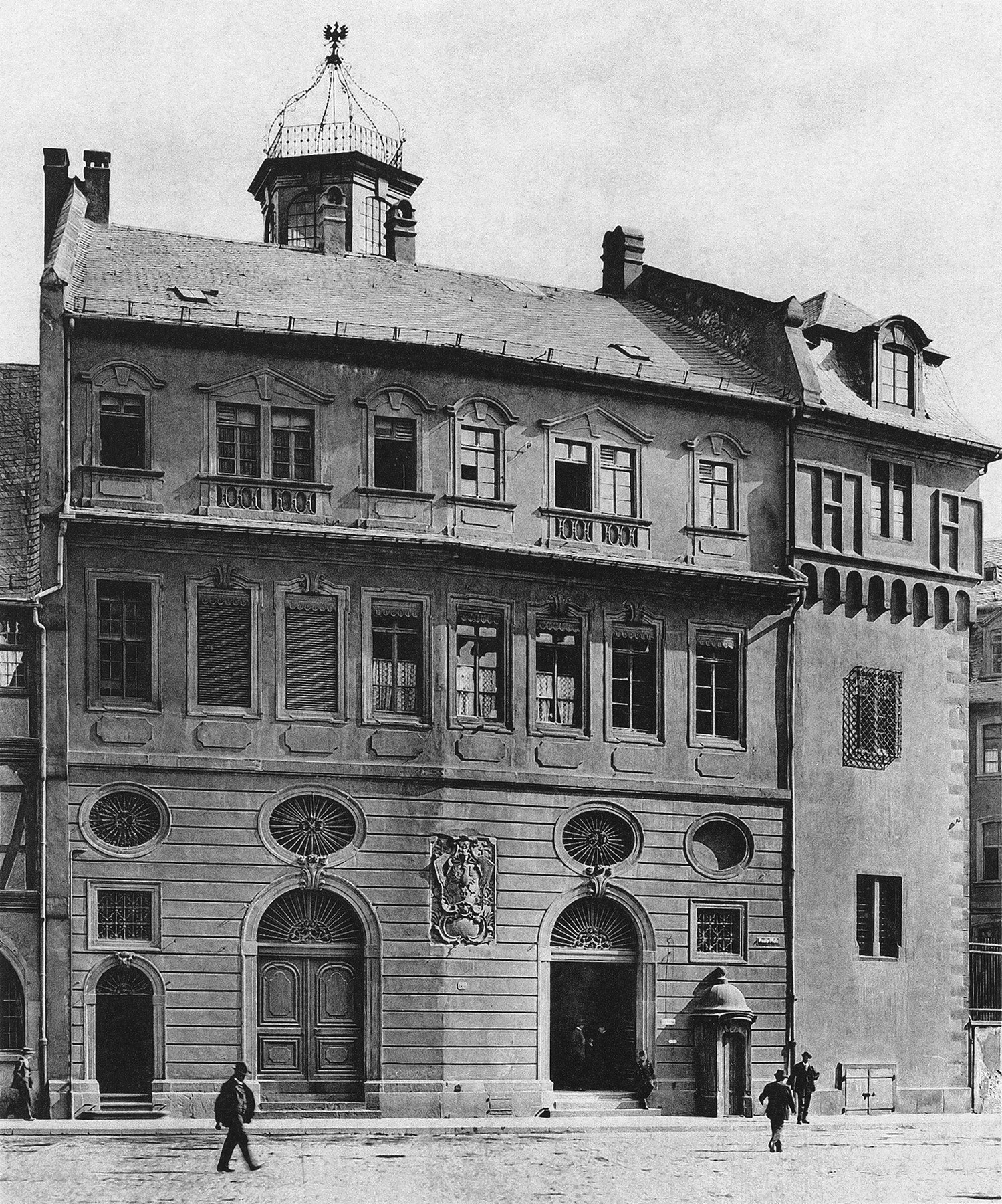 Lersner sagt in seiner Frankfurter Chronik (I 264). „An Stelle des Römertheils nach dem Paulsplatz zu, hat früher der goldene Schwan gestanden“. Der goldene Schwan wird 1322 zuerst als goldener Frosch, 1380 als goldener Schwan erwähnt. Im Jahre 1405 wurde er von dem Rathe sammt dem Römer käuﬂich erworben und umgebaut; aus dieser Zeit stammt die Halle und die Wachtstube. In den Jahren 1561–63 erhielt der goldene Schwan einen neuen Dachstuhl und eine Steinfacade (statt der bisherigen Fachwerkfacade) nach dem Römerhöfchen zu und auch die Wachtstube wurde mit grösserenFenstern versehen. Die heutige Facade nach dem Paulsplatz ebenso die Kuppel erhielt der goldene Schwan im Jahre 1731. Sie wurde von Jacob Samhammer aus Hanau, der in den Jahren 1727 bis 1745 hiesiger Stadtbaumeister war und auch die Hauptwache erbaute, in massiven Steinen errichtet. In die Halle führen zwei rundbogige Thore, über denen ovale Fenster angebracht sind. Neben dem linken Thore befindet eine Thüre als Einlass zur Bürgermeistertreppe, neben dem rechten Thore ein in rothem Sandstein gearbeitetes Schilderhaus. Zwischen beiden Thoren ist der von Schwarzburger ausgeführte Wappenstein mit dem Frankfurter Adler. Das erste Obergeschoss enthält das Bürgermeisteramt, das zweite verschiedene Bureaux. Im Erdgeschoss liegt die im Winkel fortgesetzte zweischiffige Römerhalle mit rippenlosen Kreuzgewölben überdeckt; sie hat vier freistehende Säulen mit runder Basis und achteckigem Sockel, die Gurtbogen, welche die Decke in Dreiecke zerlegen, wachsen aus den runden Schatten der Pfeiler heraus. Die Wandpfeiler haben den Sockel der freistehenden Säulen, einen cylindrischen Schaft und ein Kapitäl. Das Haus „goldner Schwan“ ist auf der einen Seite von dem zum Haus „Frauenrode“ gehörigen Archivithurm, auf der andern Seite vom Hause „Wanebach“ ﬂankirt.